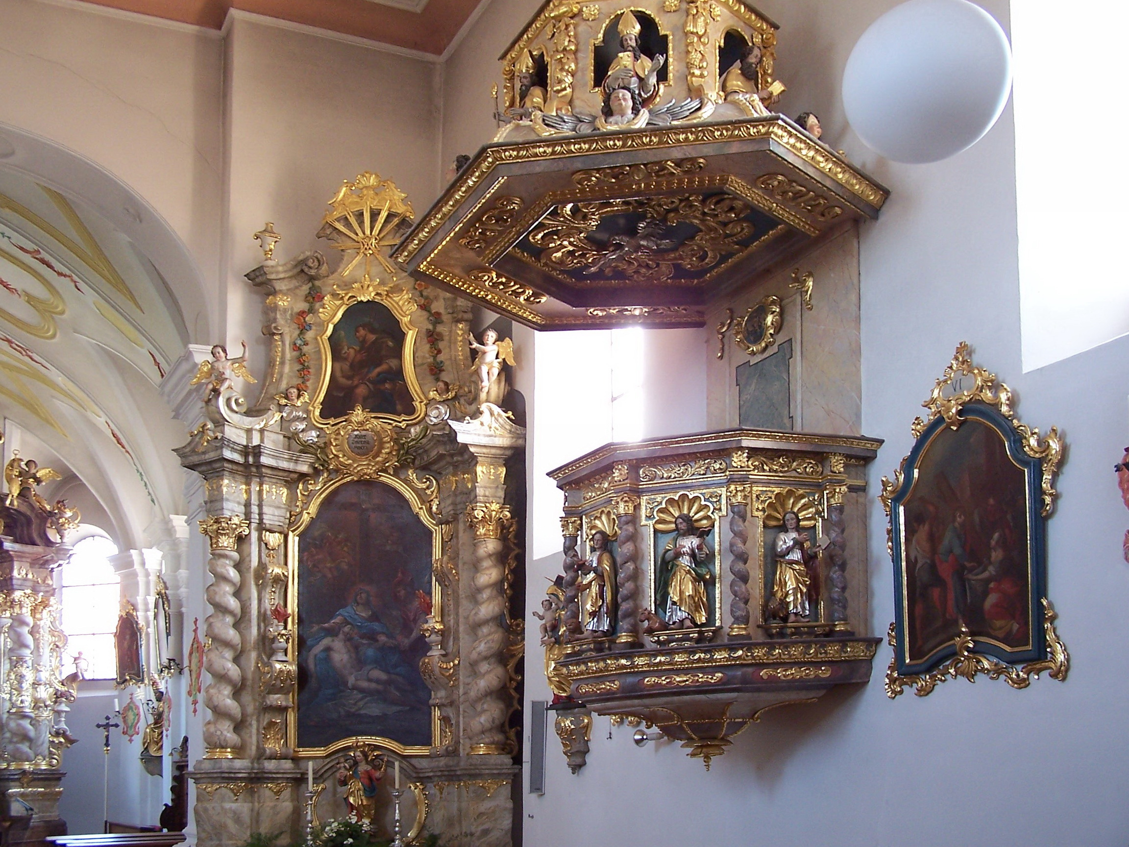 Sandsbach, Am Kirchberg 3; Am Kirchberg 2. Katholische Pfarrkirche St. Petrus. Rechter Seitenaltar aus der Zeit um 1750. Altar mit zwei gewundenen Säulen. Das Altarblatt zeigt die Beweinung Christi. Auf dem Altartisch kleine Figur St. Josef.